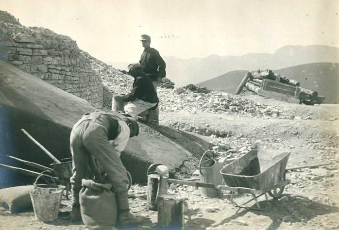 Снимка на австро-унгарски войници строящи бетонни укрепления в Южен Тирол.